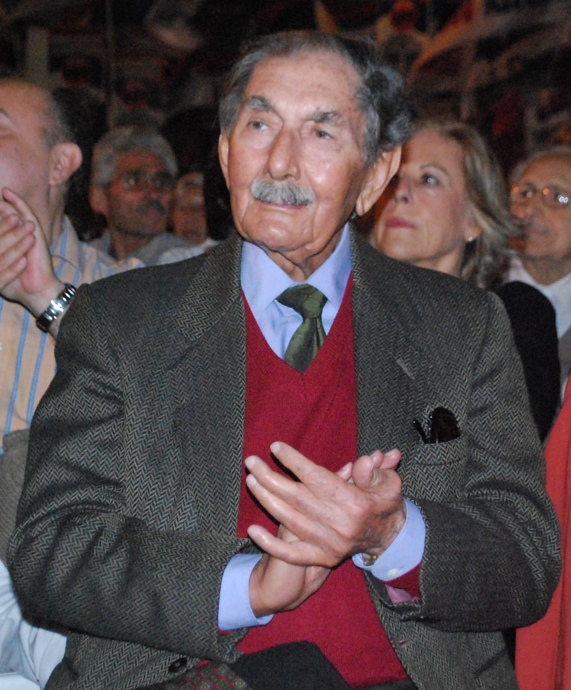 Víctor Manuel Licandro en el 38º aniversario del primer acto de masas del Frente Amplio (Montevideo).